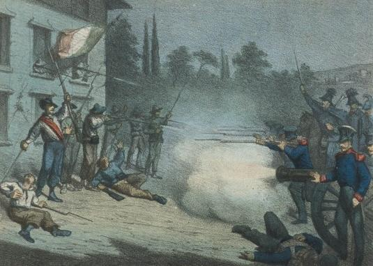 "Assalto alla casa di Ciro Menotti", litografia.